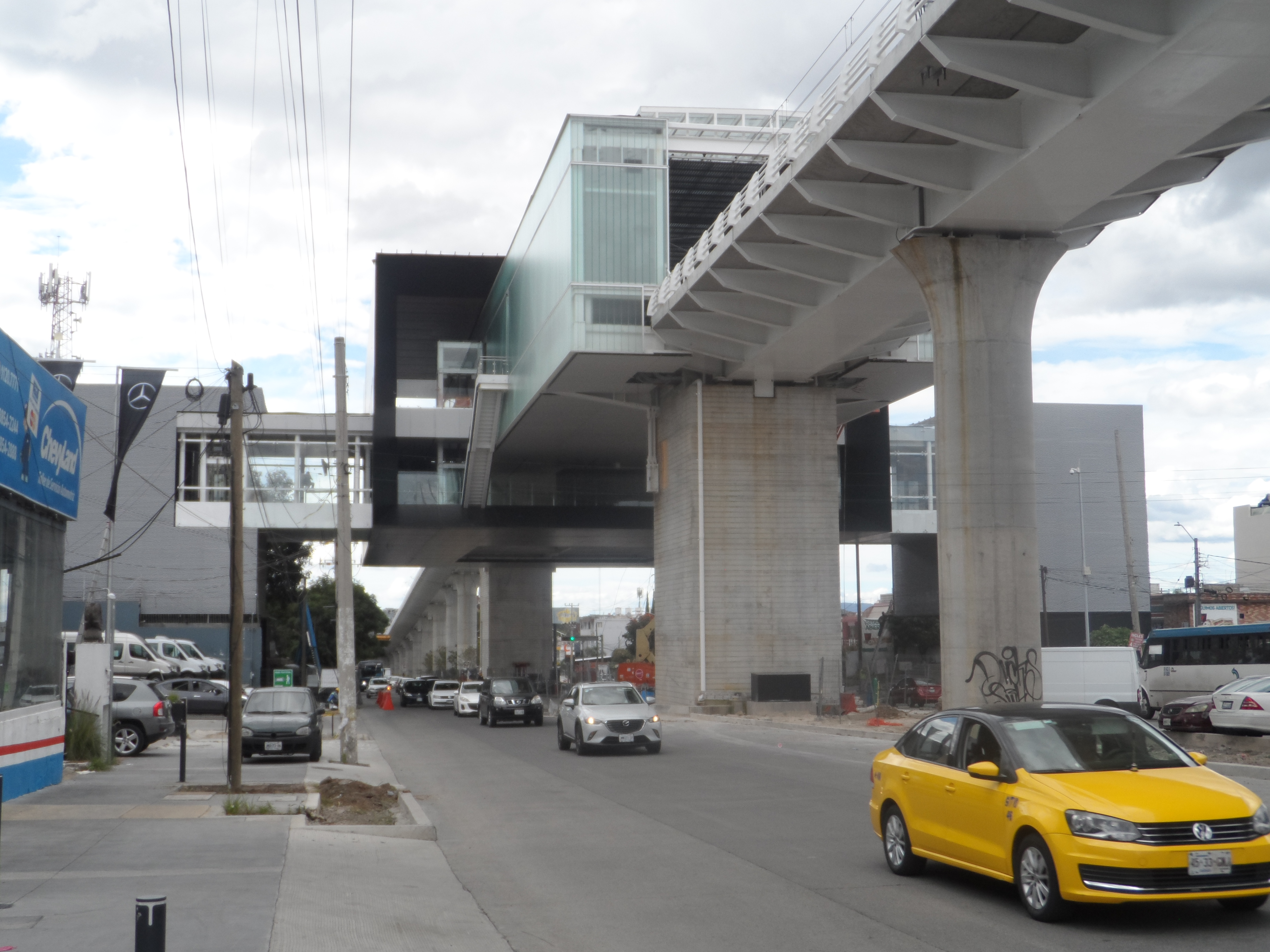 Vista externa de la estación "Circunvalación Country" de la Línea 3 del Tren Ligero de Guadalajara.